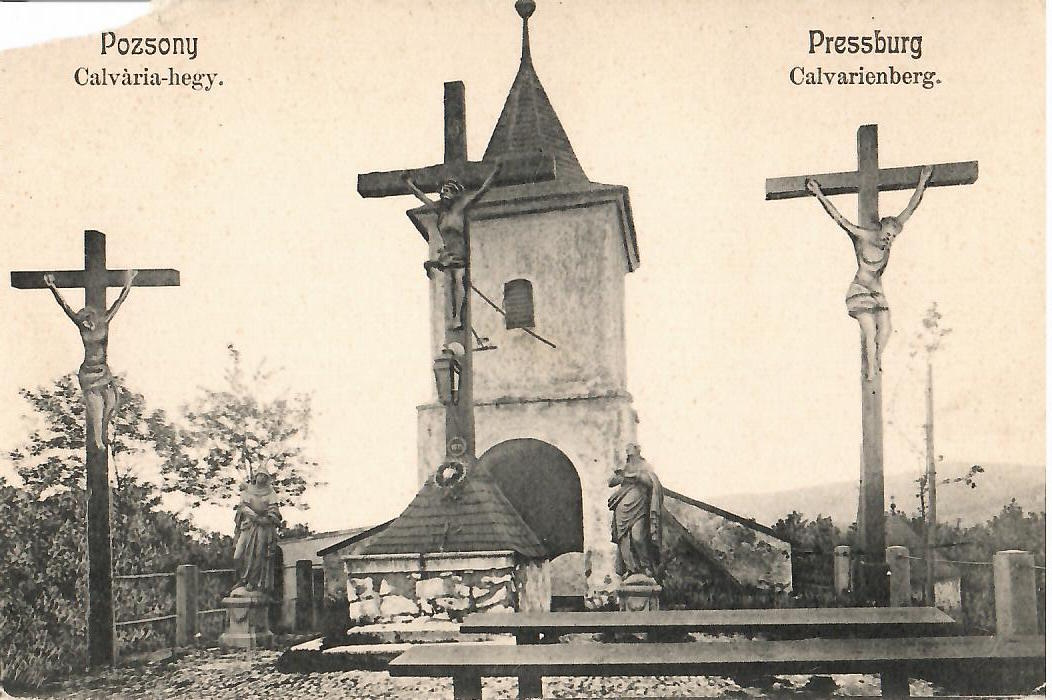 Historische Ansichtskarte um etwa 1910